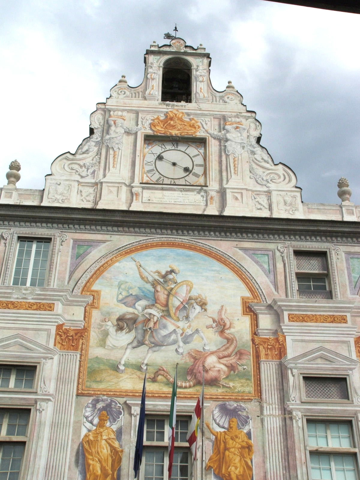 Palazzo San Giorgio (Genova), particolare della facciata e principale e orologio